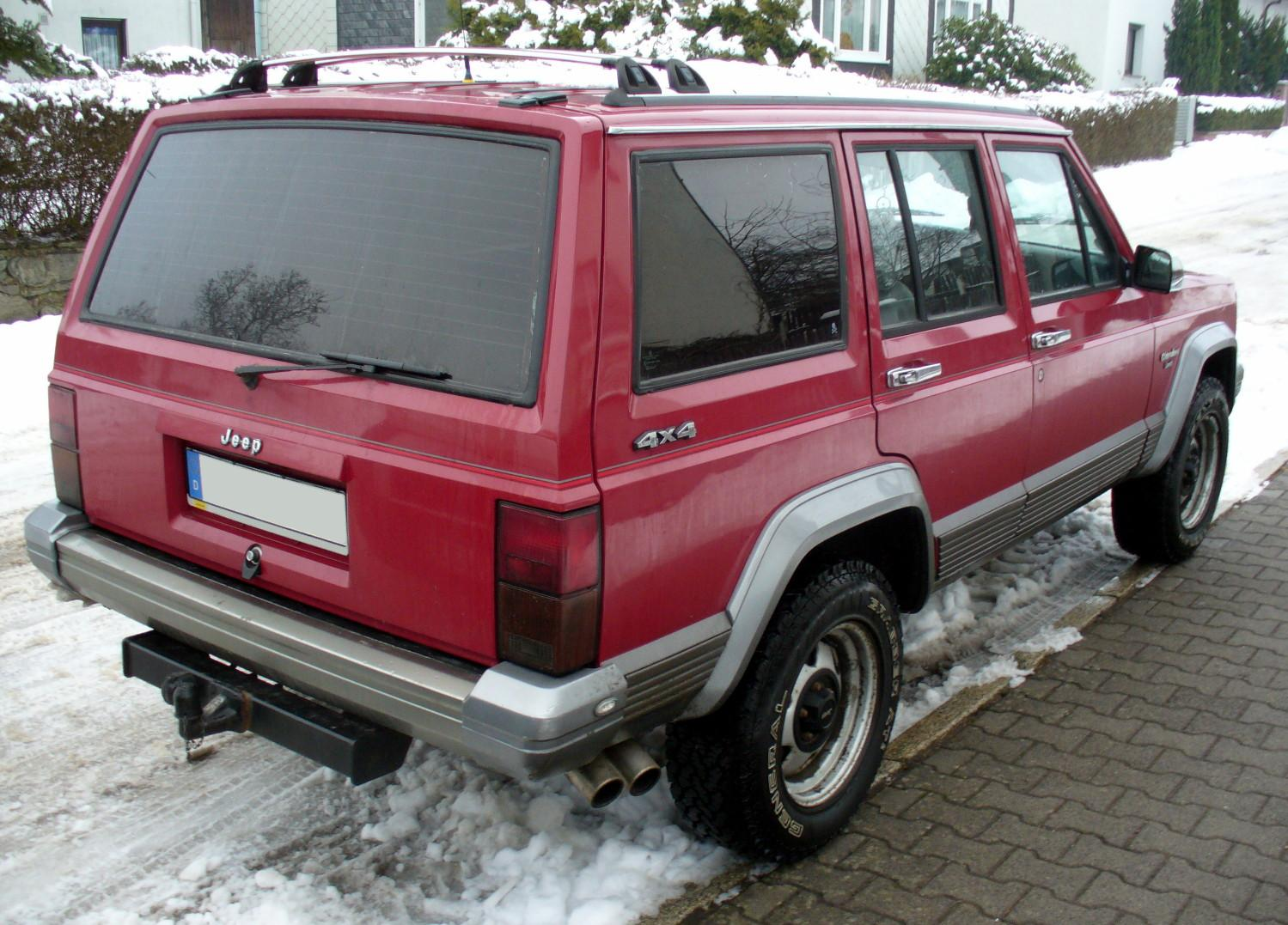 Jeep Cherokee